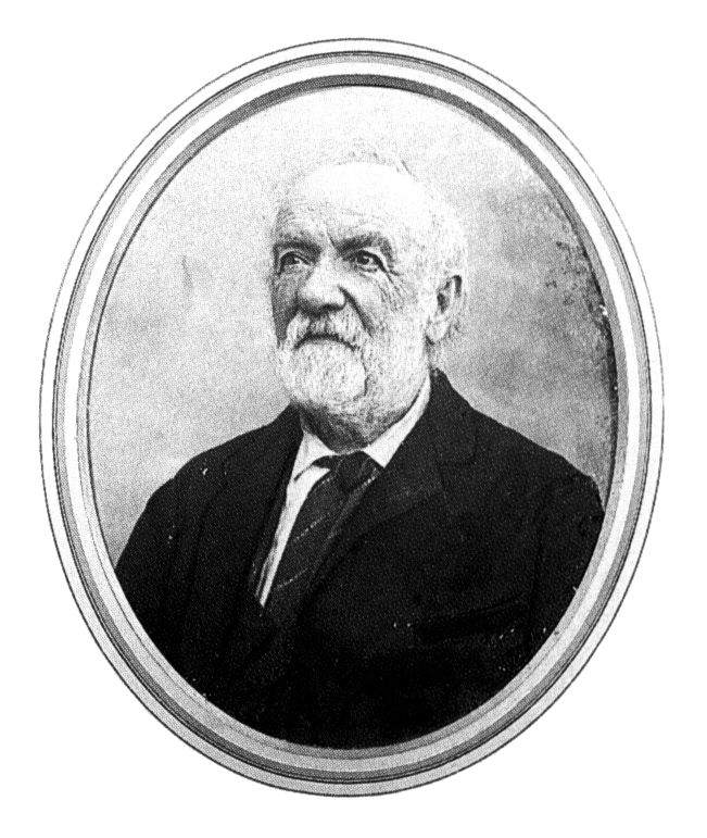 Francesco Minà Palumbo (14 March 1814, Castelbuono – 12 March 1899)